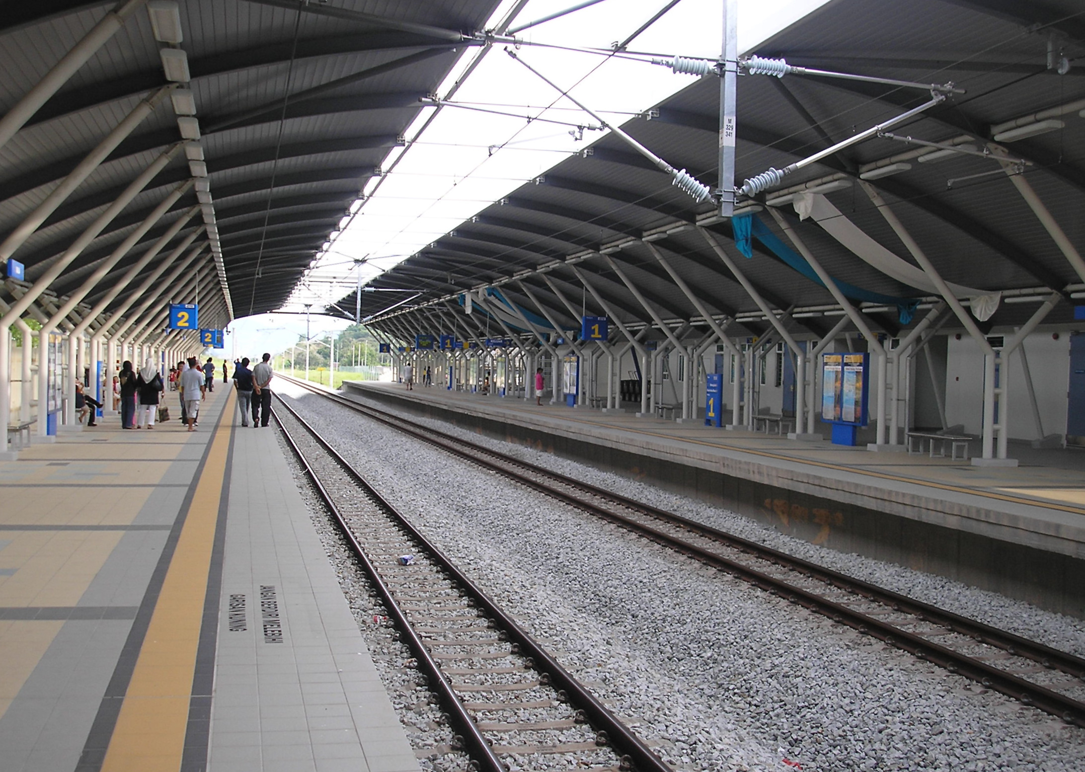 The Rasa station (Rasa-Rawang), at Rasa, Selangor, Malaysia.